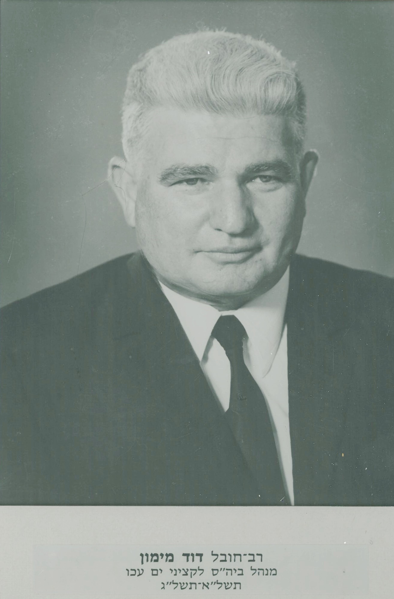 רב חובל דוד מימוןמנהל בית הספר בשנים תשל"א -תשל"ג